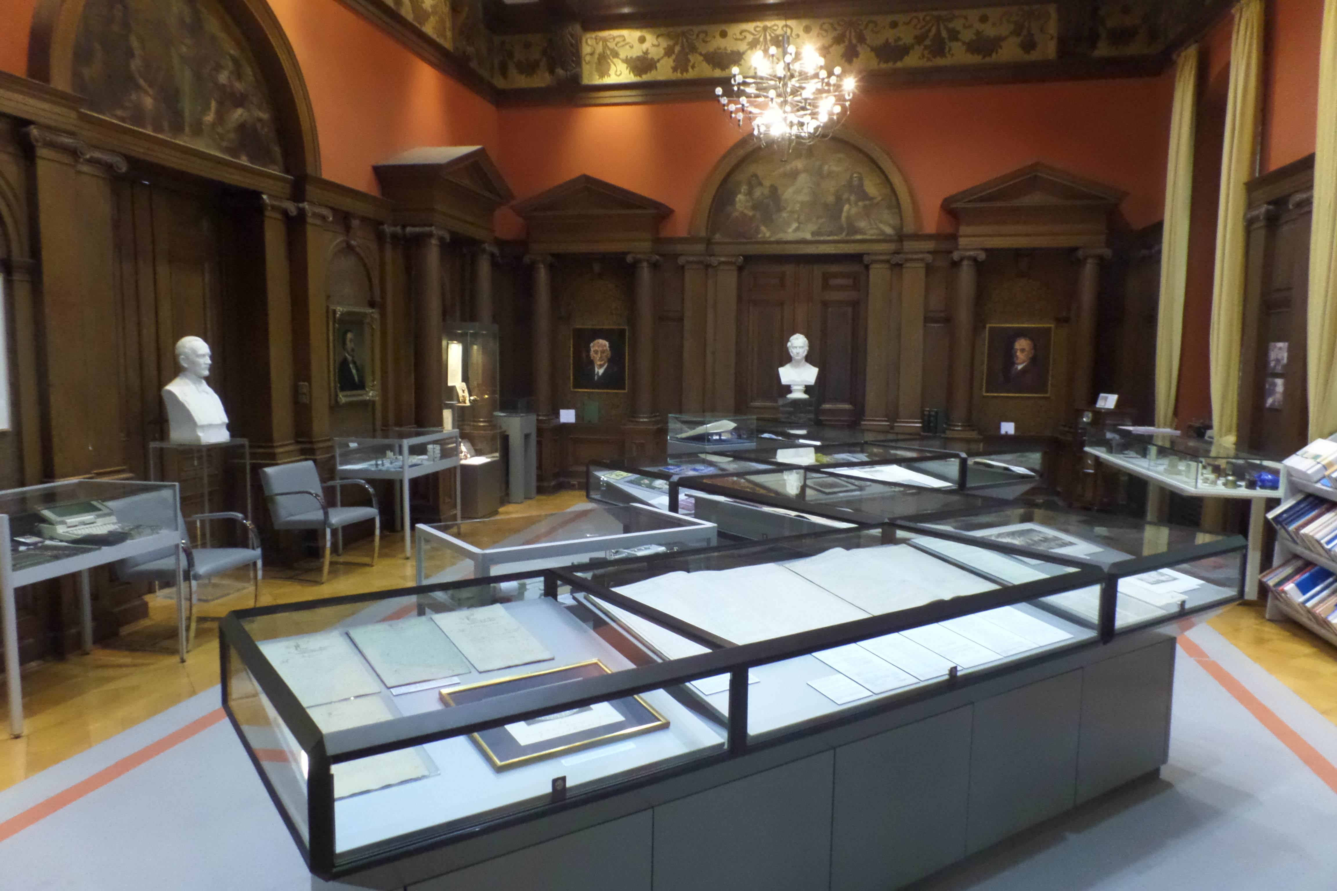 In einem der Ausstellungsräume wird die Entwicklung der deutschen Versicherungswirtschaft ausgehend von den Leistungen Ernst Wilhelm Arnoldis gezeigt.